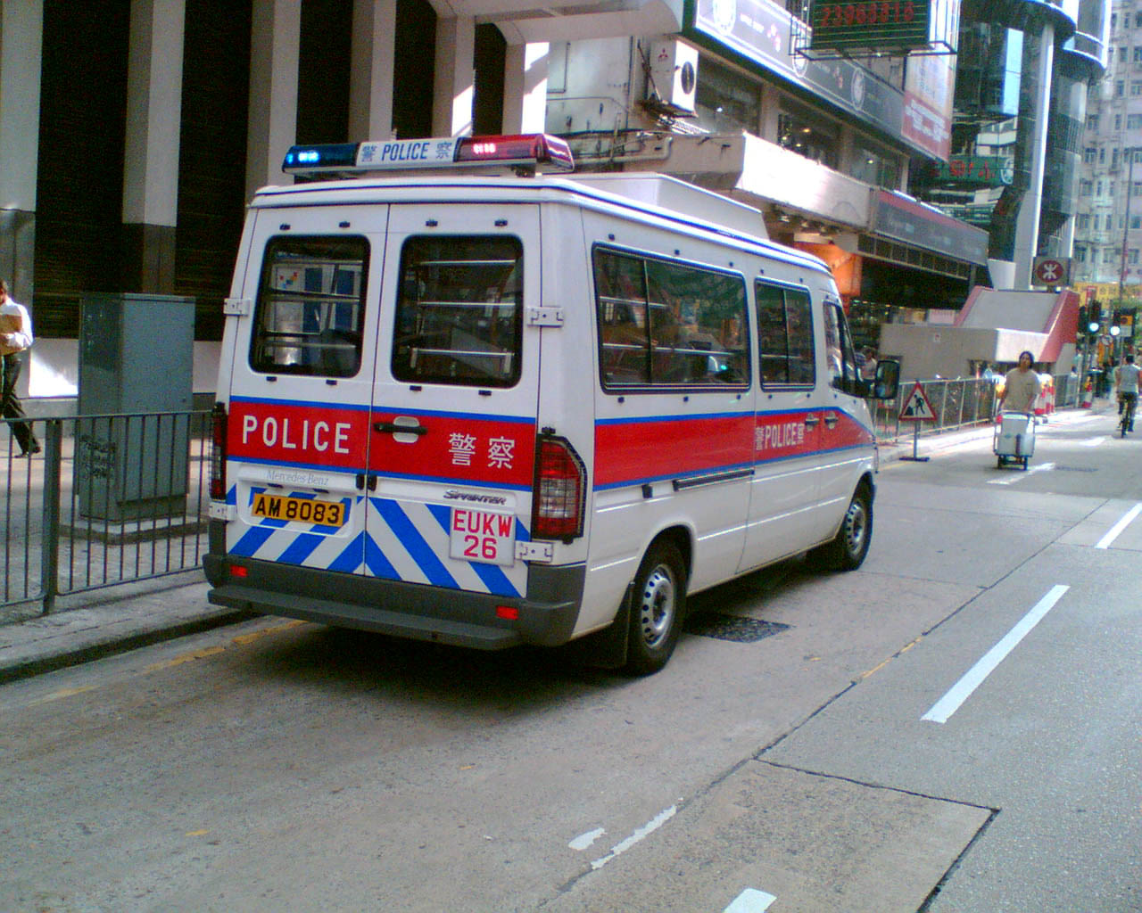 執勤中的警車